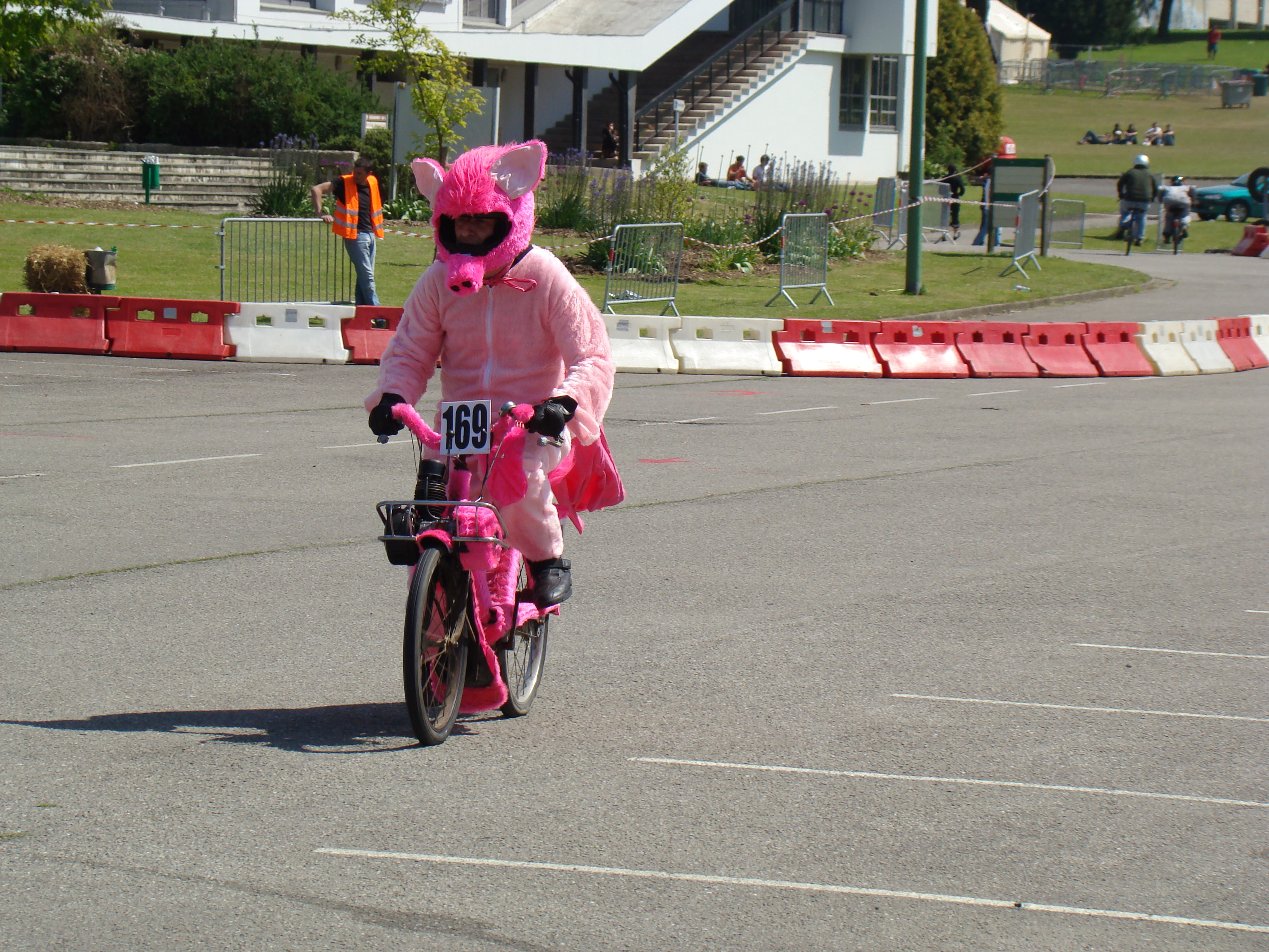 Un costume original lors du Rock'n Solex 2009 (ici, durant la course d'endurance).